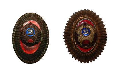 Кокарды1947